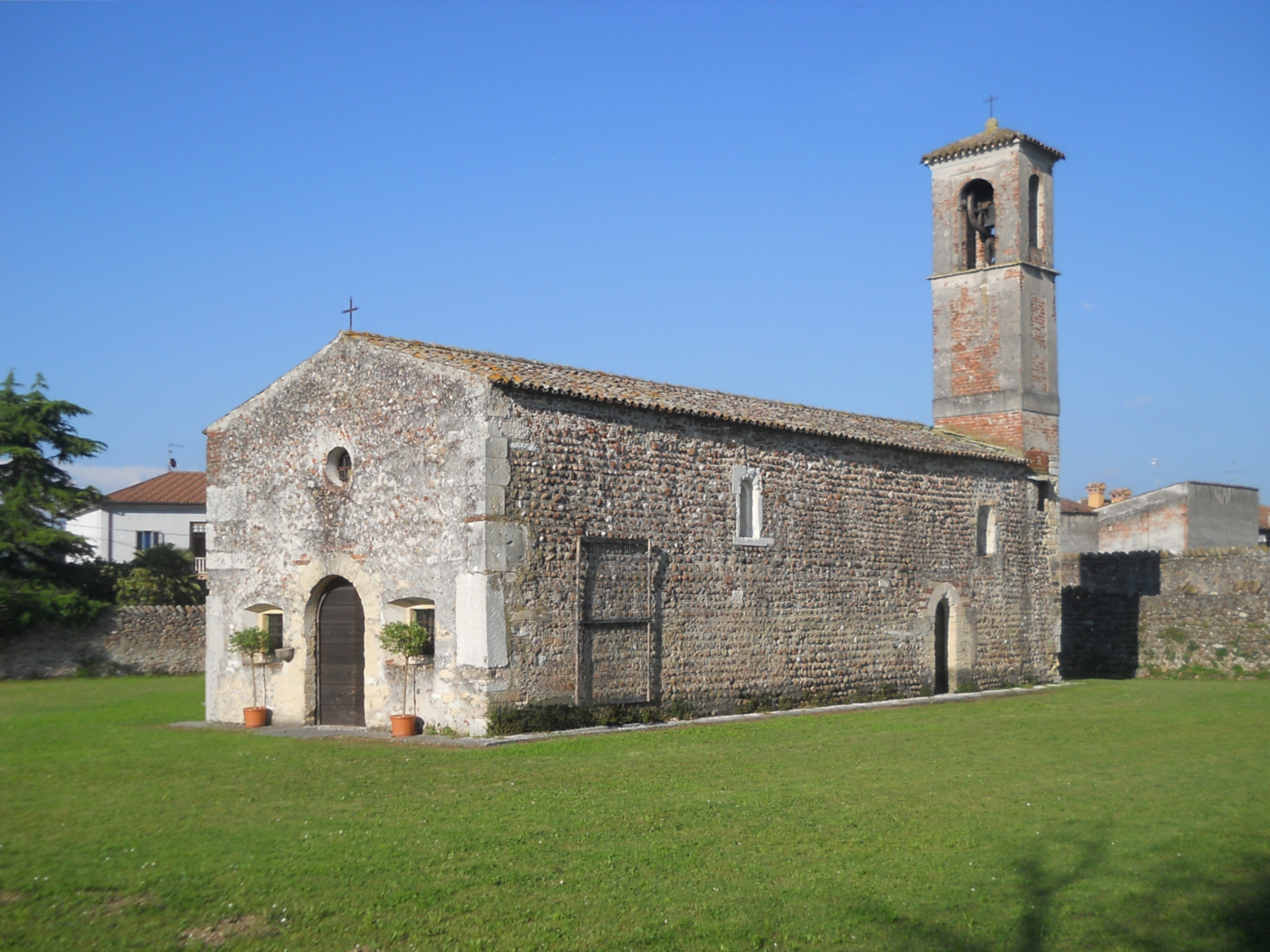 Esterno della chiesa romanica di San Michele Arcangelo a Pescantina (provincia di Verona)